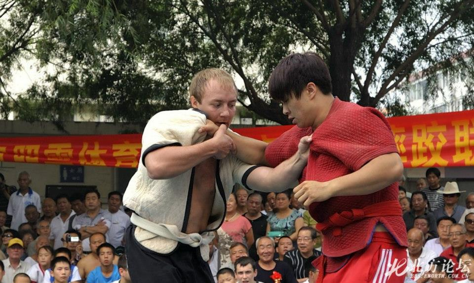 Evgeni Goncharov 在天津與中國摔跤手交流